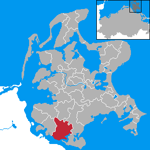 Poseritz, Landkreis Rügen, Mecklenburg-Vorpommern